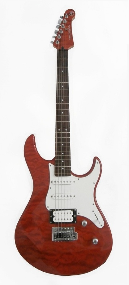 Czerwona gitara Yamaha Pacifica 212, układ HSS, tremolo jednostronne